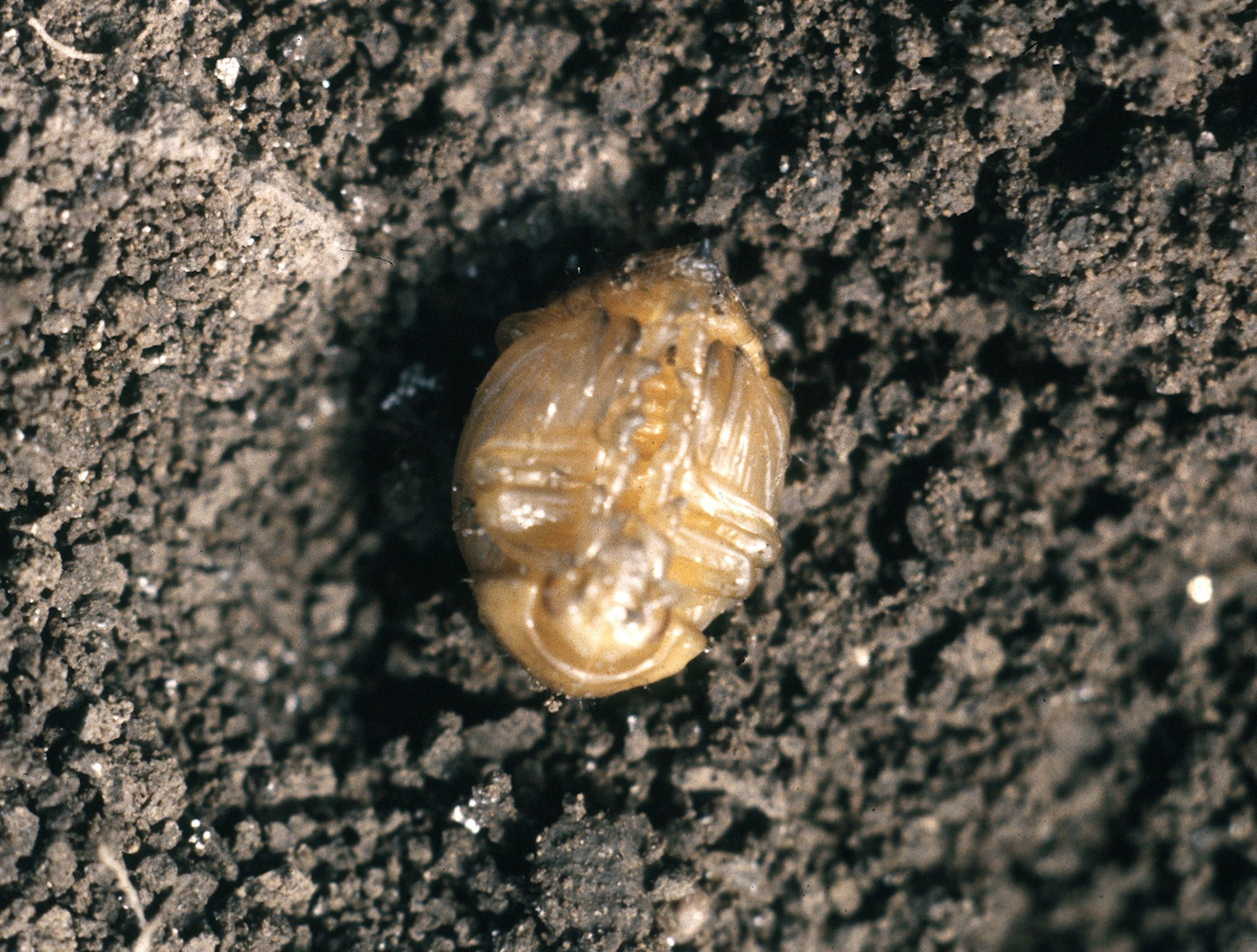 Pupe de Leptinotarsa decemlineata (Chrysomelidae)